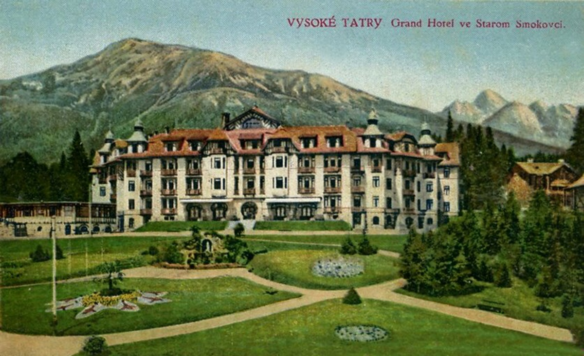 Grandhotel